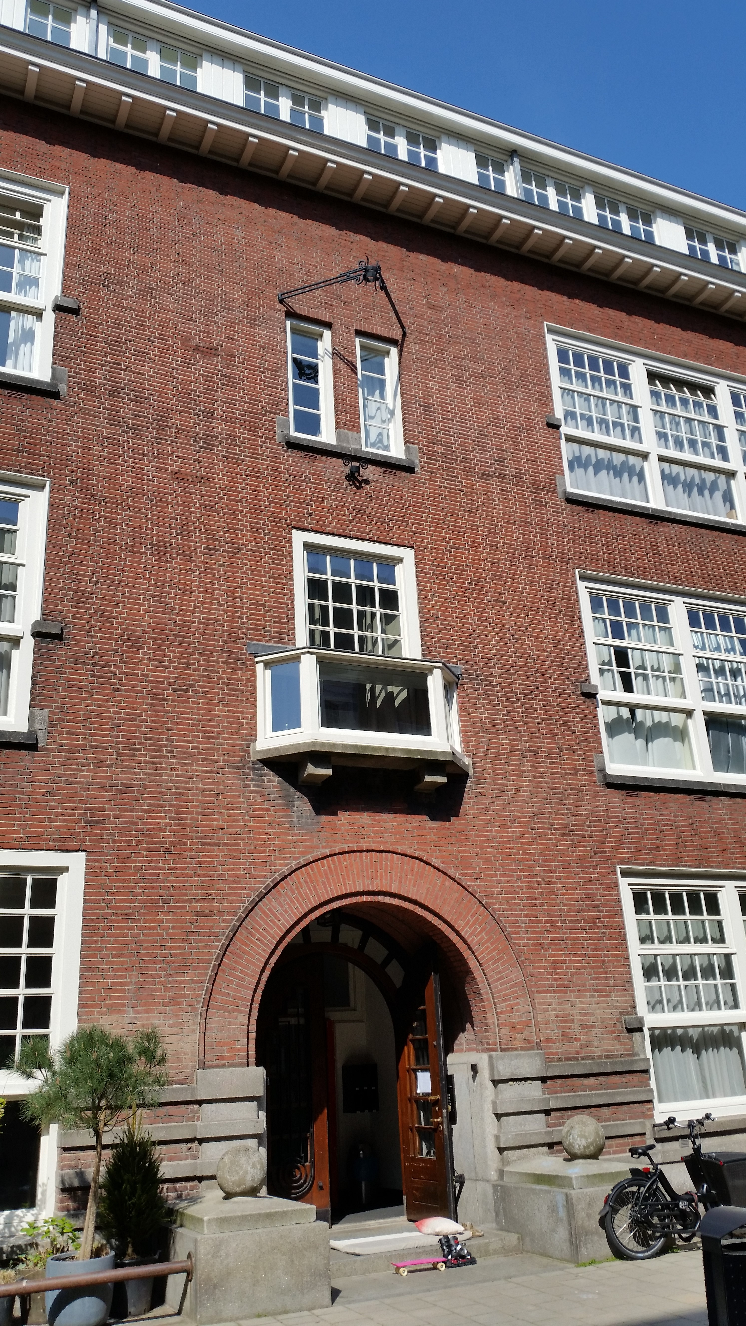 Toegang tot Floris Versterstraat 10-12, Amsterdam met de stenen ballen van later datum